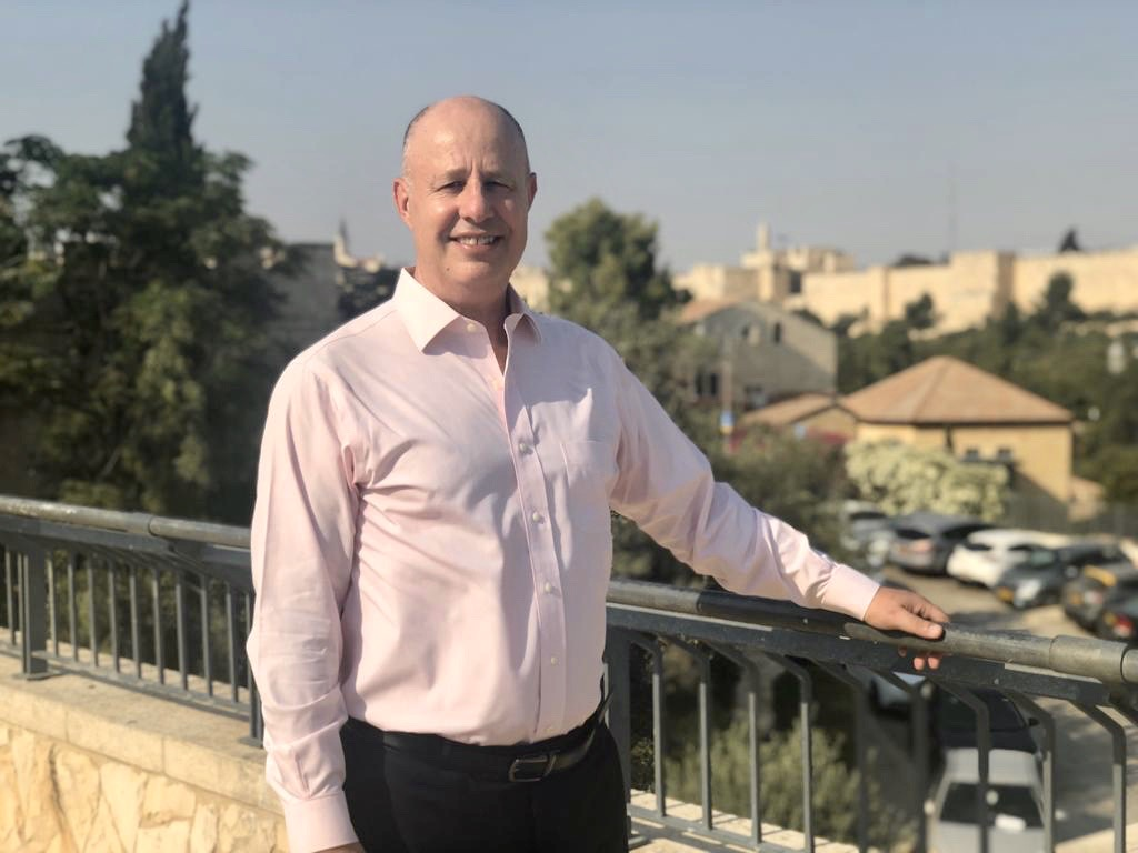 Jerusalem